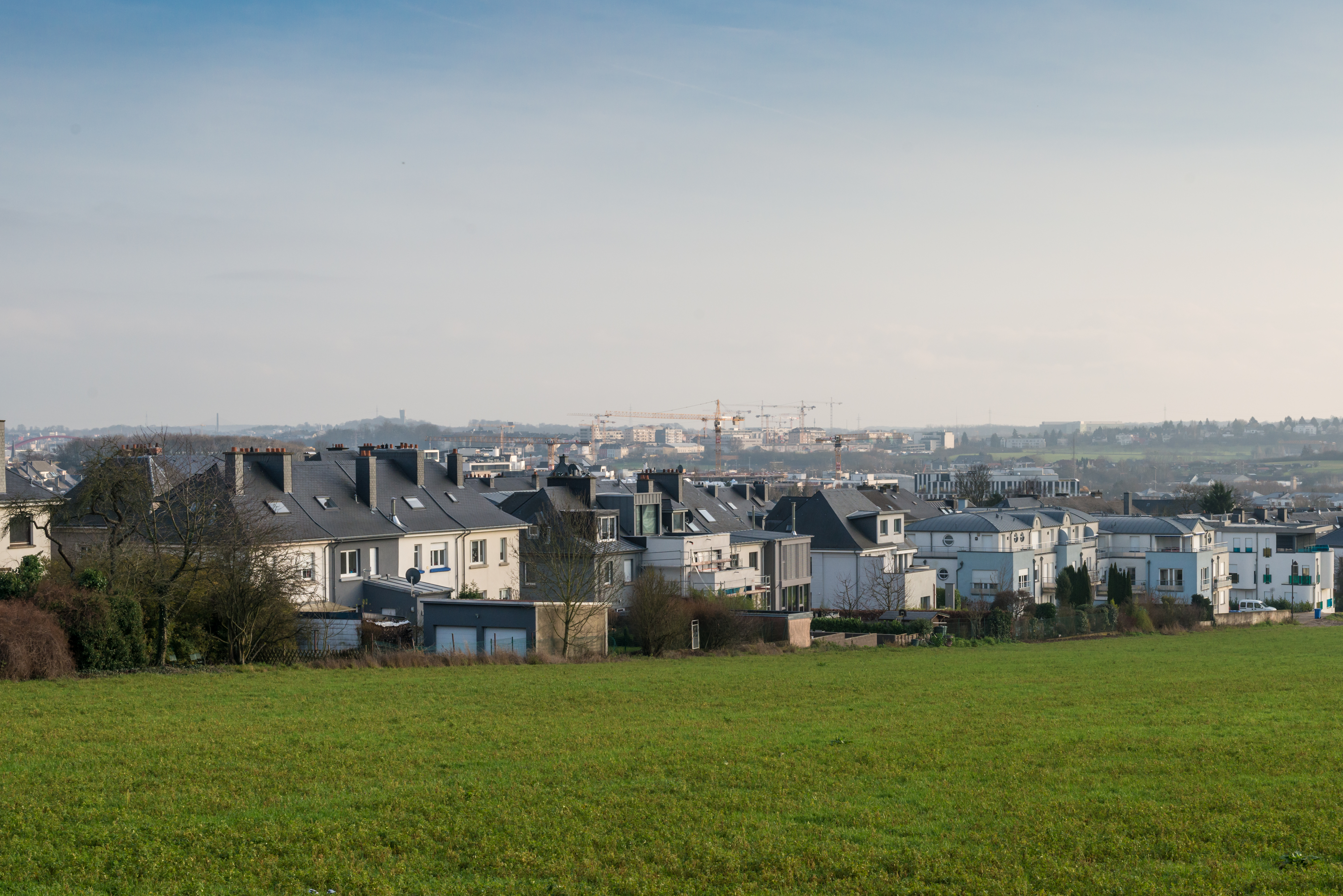 Vue iwwer Märel.